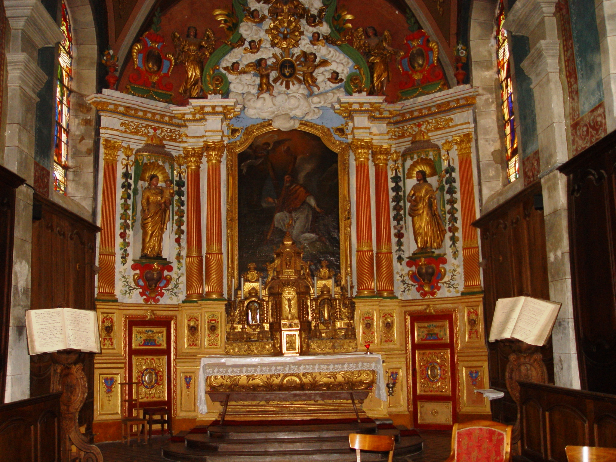 Bannans (Doubs, France), église St André, maître-autel et retable avec ses deux statues: Vierge à L'Enfant & St Joseph.